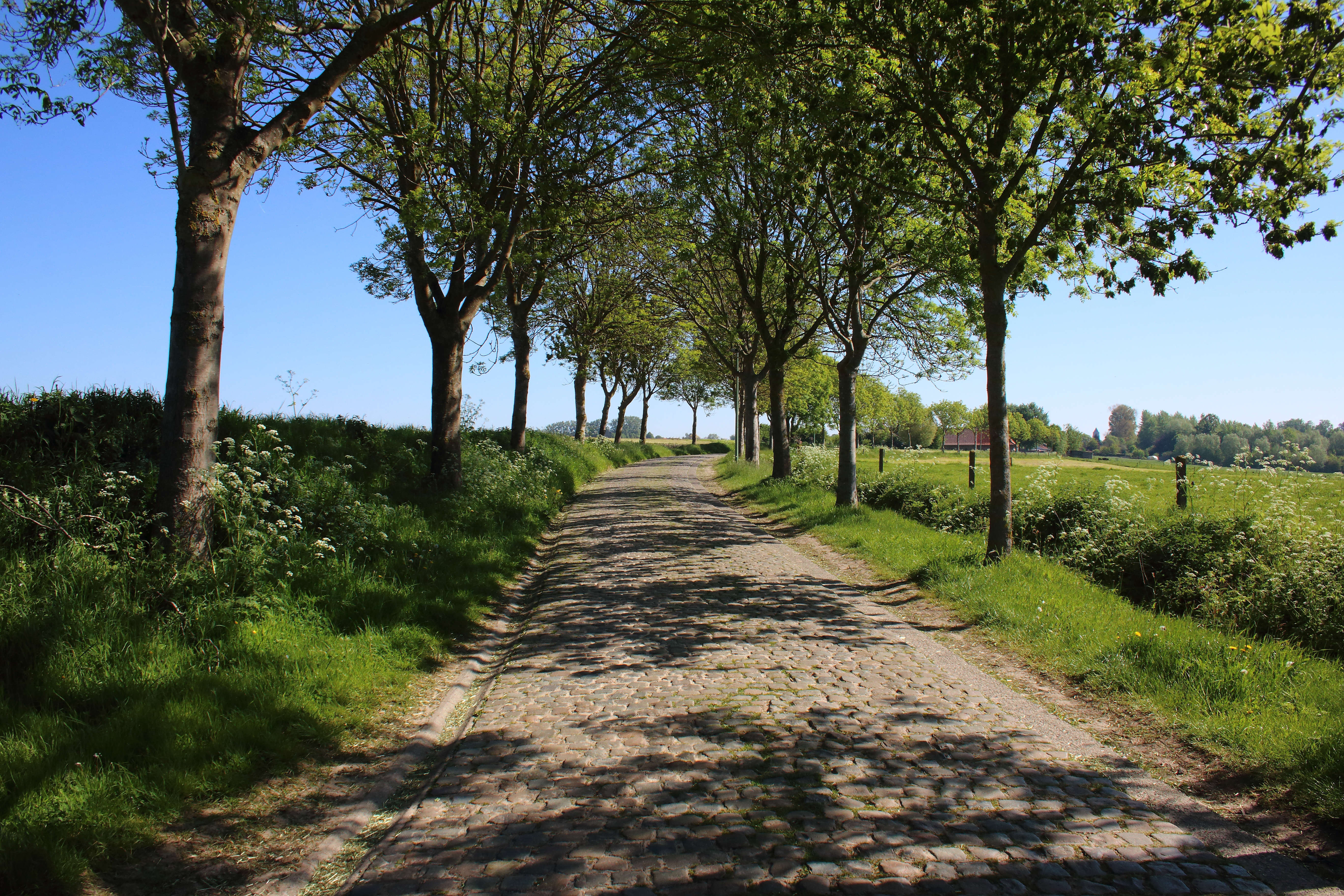 Paddestraat, Velzeke, Zottegem, Vlaanderen, België